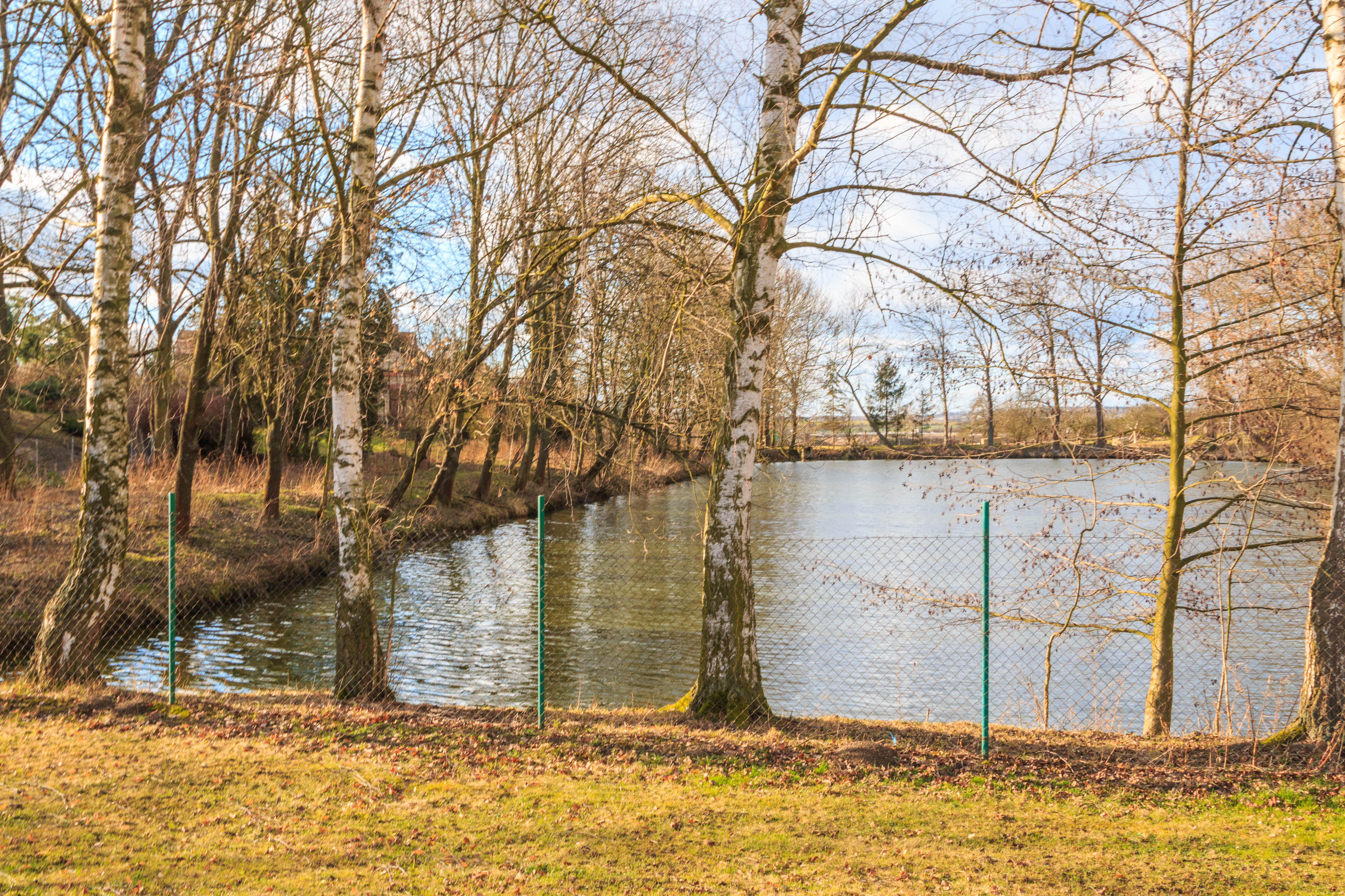 rybník Homolák v Klamoši Project: Vodstvo.